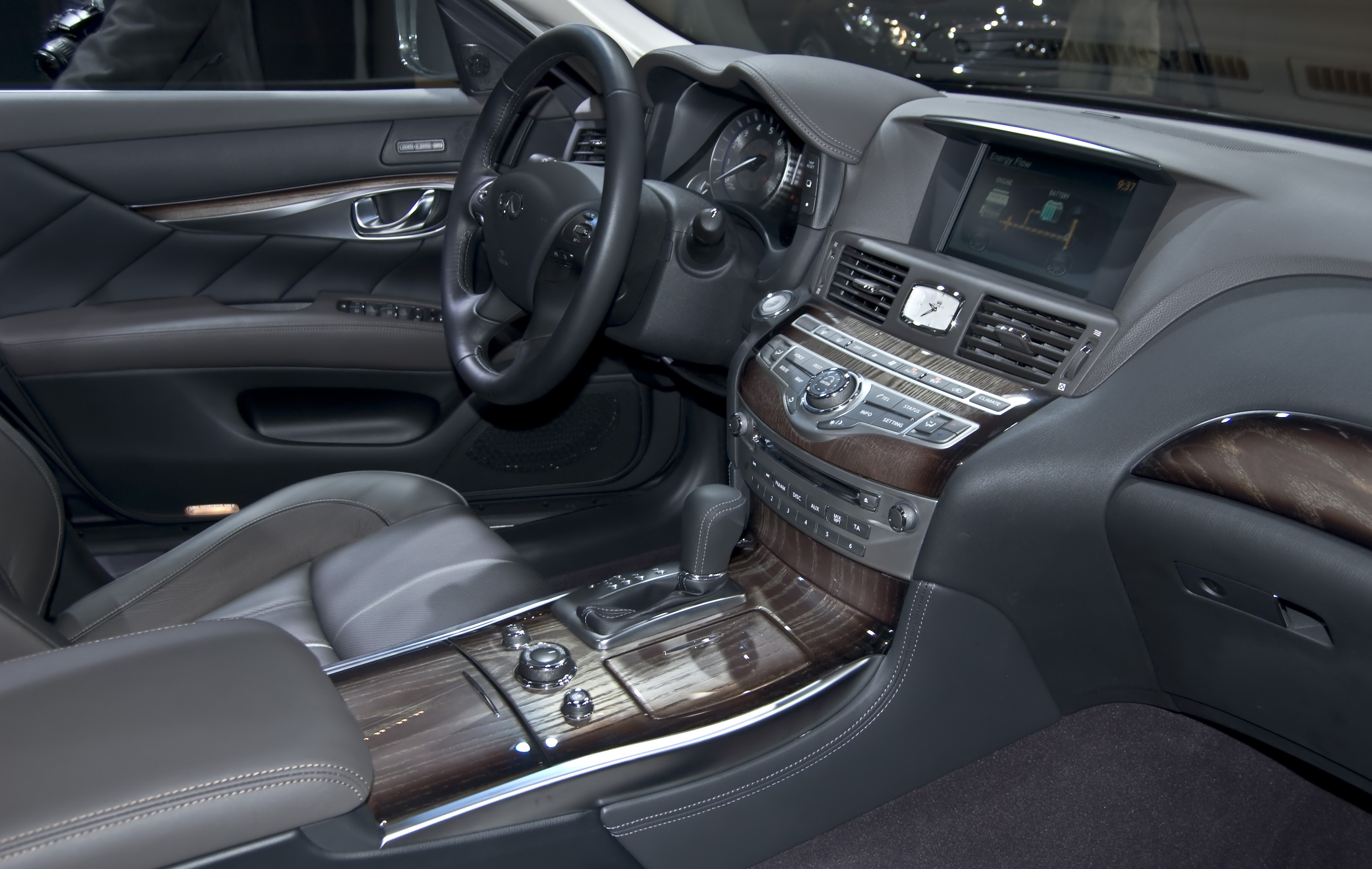 Infiniti M35 Hybrid en el Salón de Ginebra 2010.